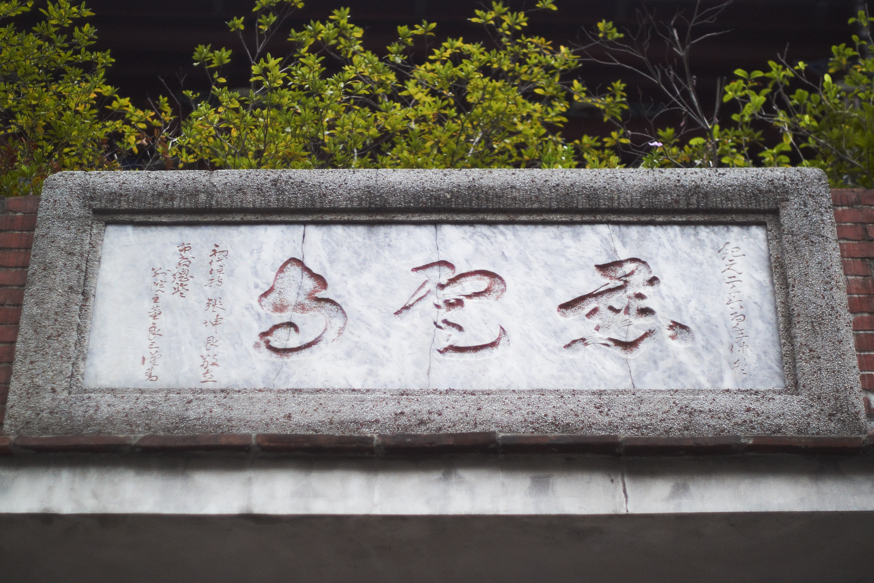 慈雲寺立字碑，由普謙法師（俗名張坤艮）題字